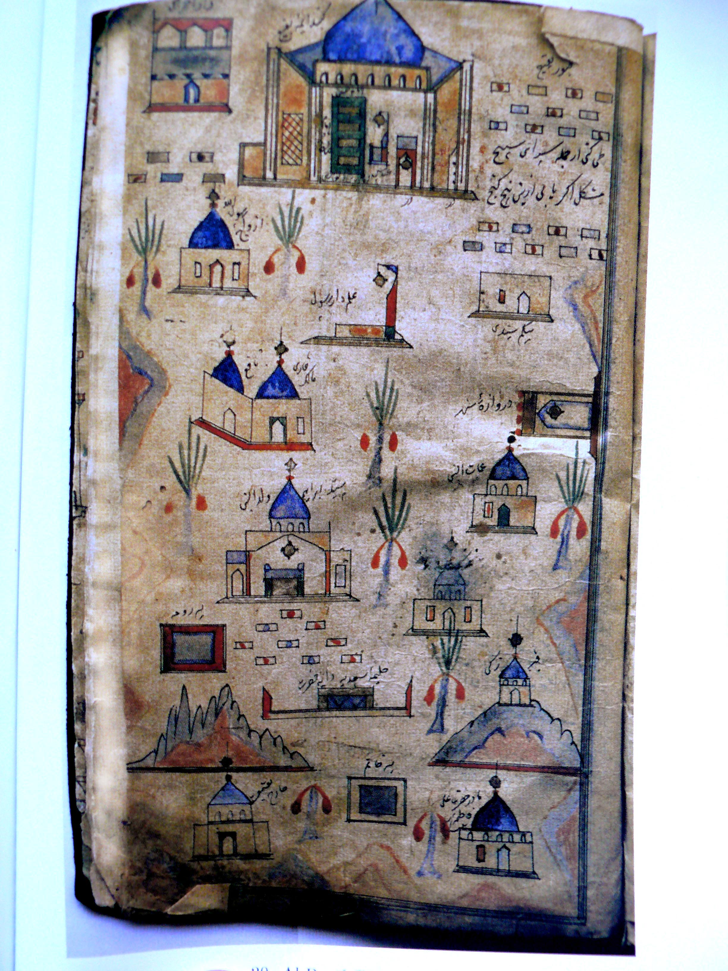 Blatt aus dem Shauq-Nama (16. Jahrhundert)